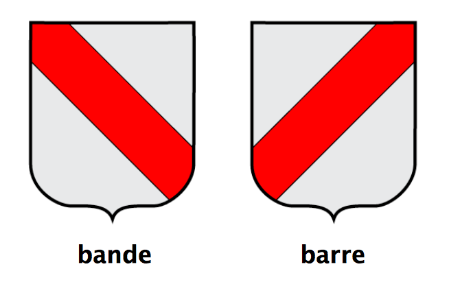 Les formes héraldiques inversées de 'barre' et 'bande'.